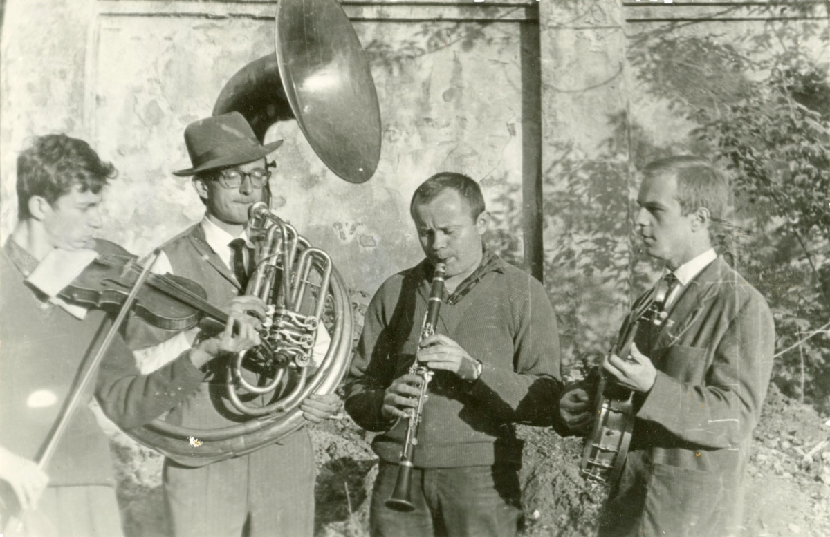 Zdjęcie założycielskie zespołu Asocjacja Hagaw od lewej: Henryk Kowalski (skrzypce), Andrzej Jastrzębski (suzafon), Andrzej Bielecki (klarnet), Grzegorz Brudko (banjo), zdjęcie wykonał Wiesław Papliński (tara)